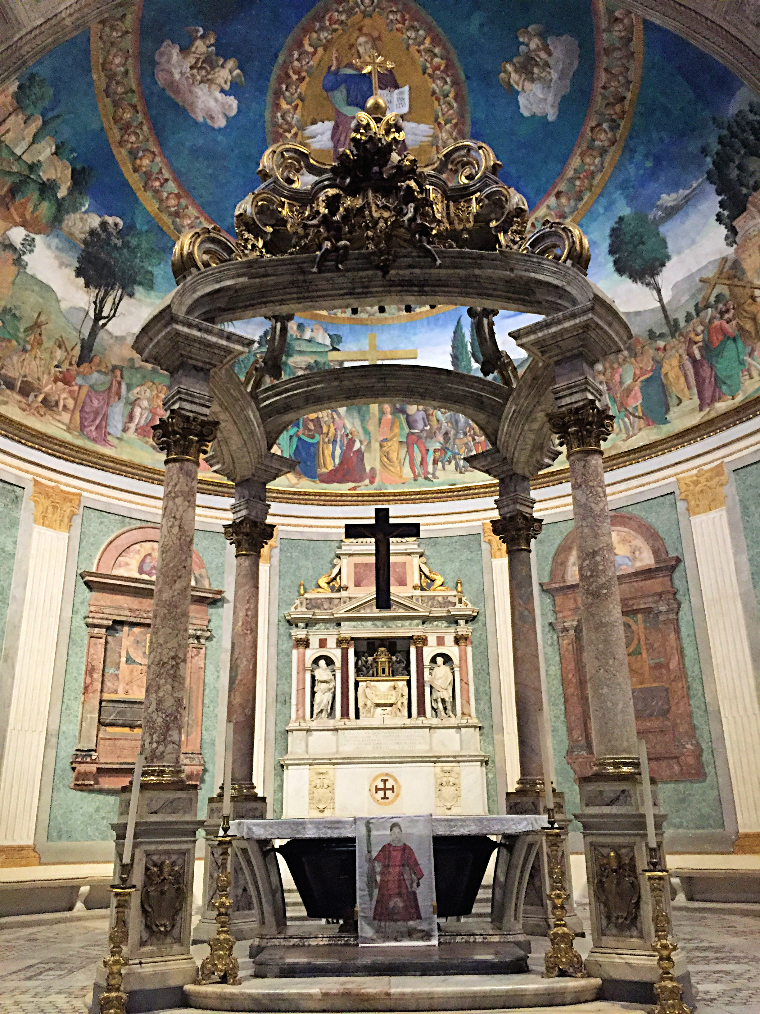 Roma, Basilica di Santa Croce in Gerusalemme, esposizione della nuova icona di San Cesario diacono e martire (opera dell'artista Giovanni Guida) sulla mensa dell'altare maggiore, con sottostante vasca di basalto contenente parte considerevole del corpo del santo. Foto di Daniela Matarazzo.